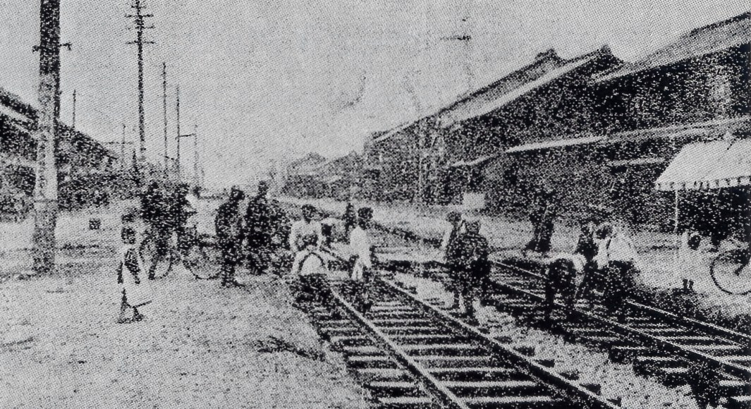 大津町線の軌道敷設工事 （大正13年4月22日付け名古屋新聞）